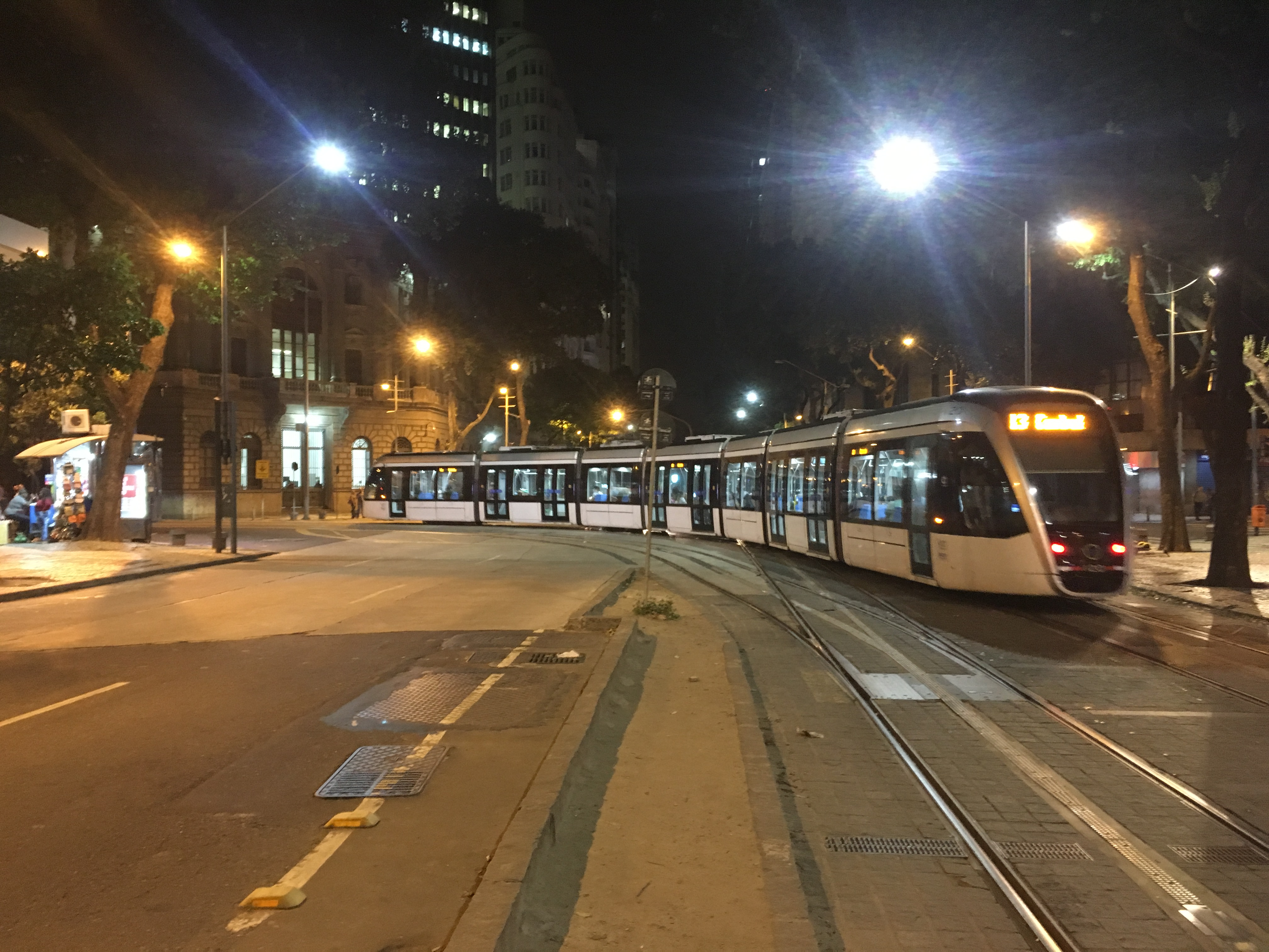 Composição do VLT do Rio de Janeiro, Linha 3, saindo da avenida Rio Branco e entrando na rua Visconde de Inhaúma.